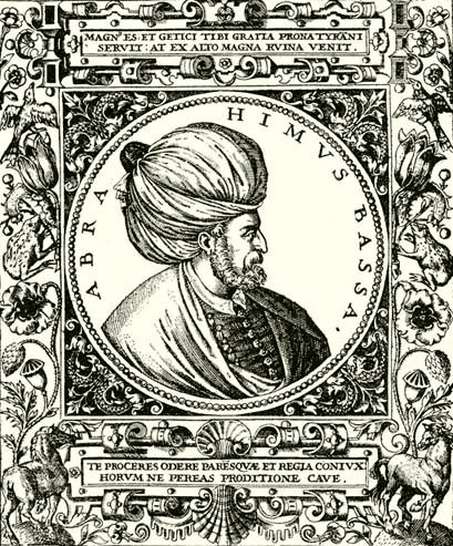 Osmanlı Sadrazamı İbrahim Paşa